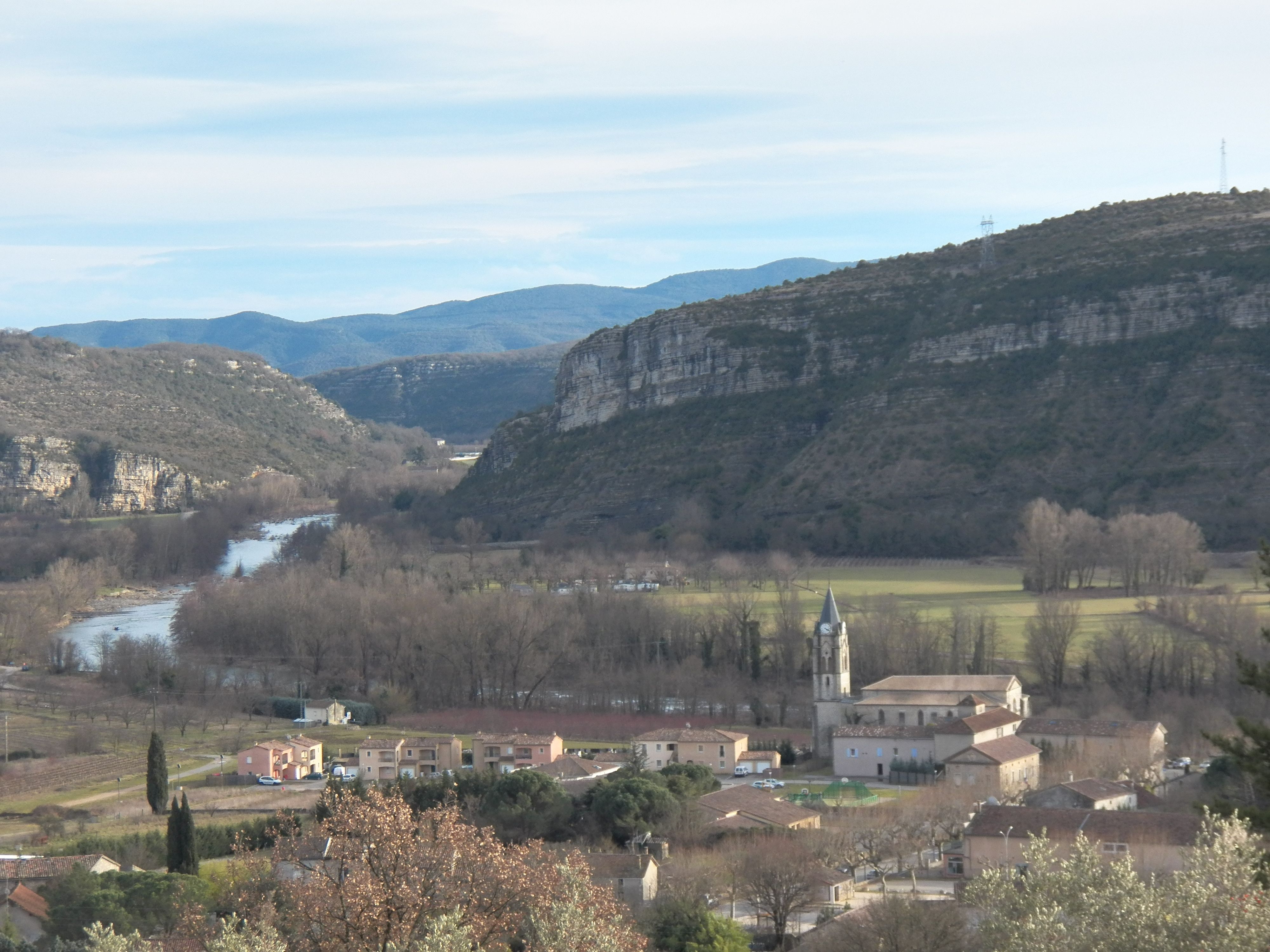 Vue des hauteurs de Rosières .